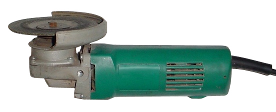 Einhand-Winkelschleifer